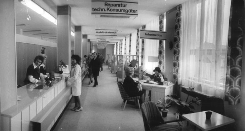 ADN-ZB-Thieme-30.10.75-gü-Bezirk Karl-Marx-Stadt 76 Dienstleistungen unter einem Dach Von der Ofenreinigung bis zur Anfertigung von Maßkleidung für Festlichkeiten reichen die 76 Dienstleistungsarten, die die Bürger von Werdau und Umgebung in einer einzigen Komplexannahmestelle in Auftrag geben können. Diese Einrichtung des Dienstleistungskombinates Karl-Marx-Stadt entstand in knapp 6 Monaten in einem ehemaligen Fabrikgebäude. Das DLK der Bezirksstadt konnte in diesem Jahr bereits über 11 Millionen Kundenwünsche erfüllen (Bildzusammenstellung mit P1030-2N)